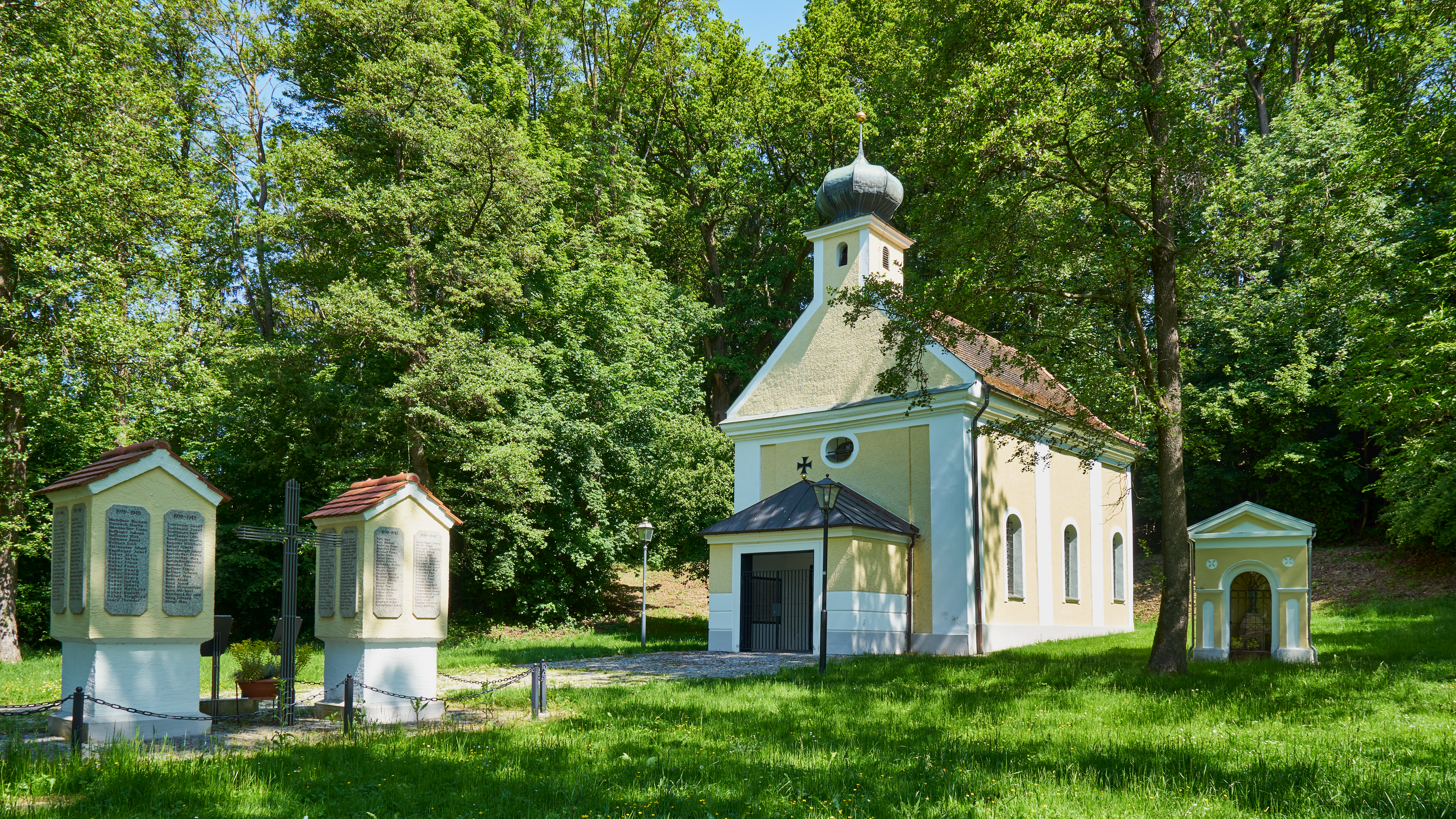 Katholische Wallfahrtskirche Mater Dolorosa, sogenannte Wieskapelle zum seligen End, polygonal schließende Saalkirche mit Rahmengliederungen und Giebeldachreiter mit Zwiebelhaube, nach Plänen von Thomas Wöger 1737-40 anstelle einer Holzkapelle von 1644, Dachreiter 1913, 1936 erweitert, 1920 als Kriegergedächtnisstätte eingerichtet; mit Ausstattung